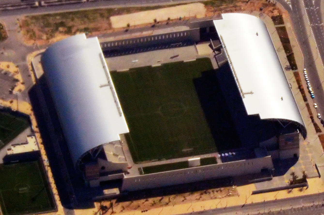 אצטדיון המושבה בפתח תקוה, מבט מצפון לדרום